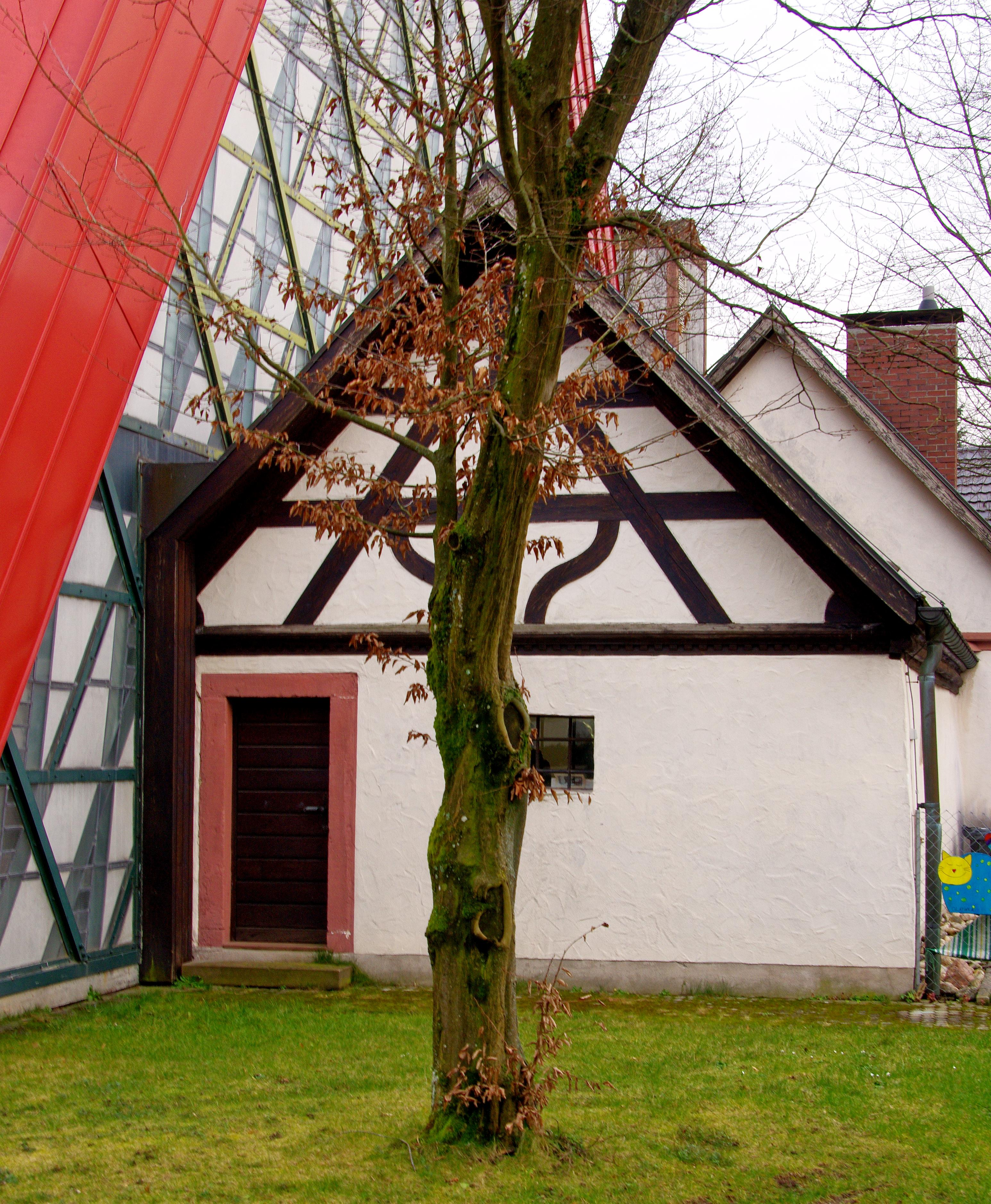 Das Beinhaus in Bleibach in dem der Totentanz gemalt ist von außen